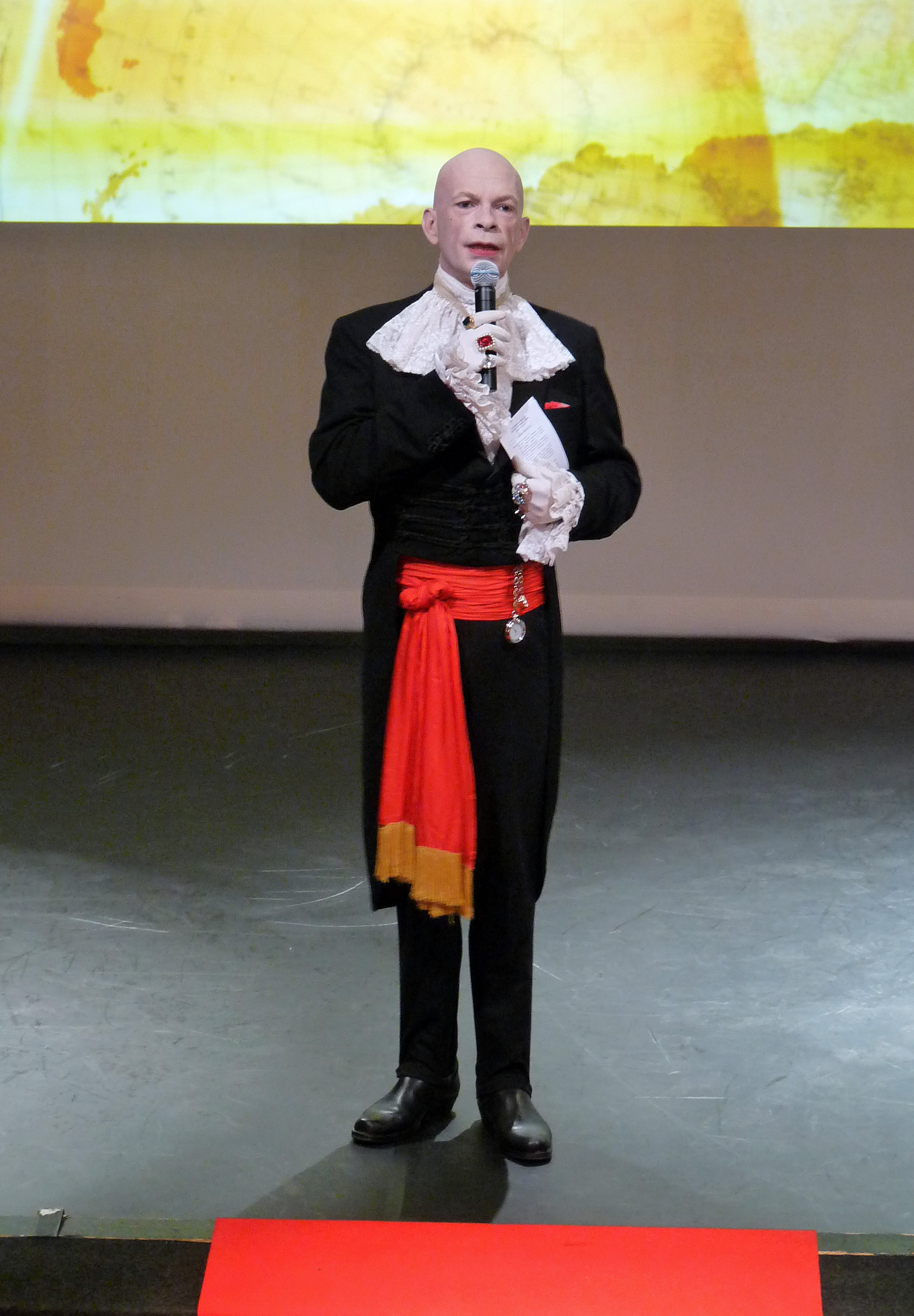 Calixte de Nigremont, en maître de cérémonie, lors de l'ouverture du 22e Festival international de géographie de Saint-Dié-des-Vosges 2011